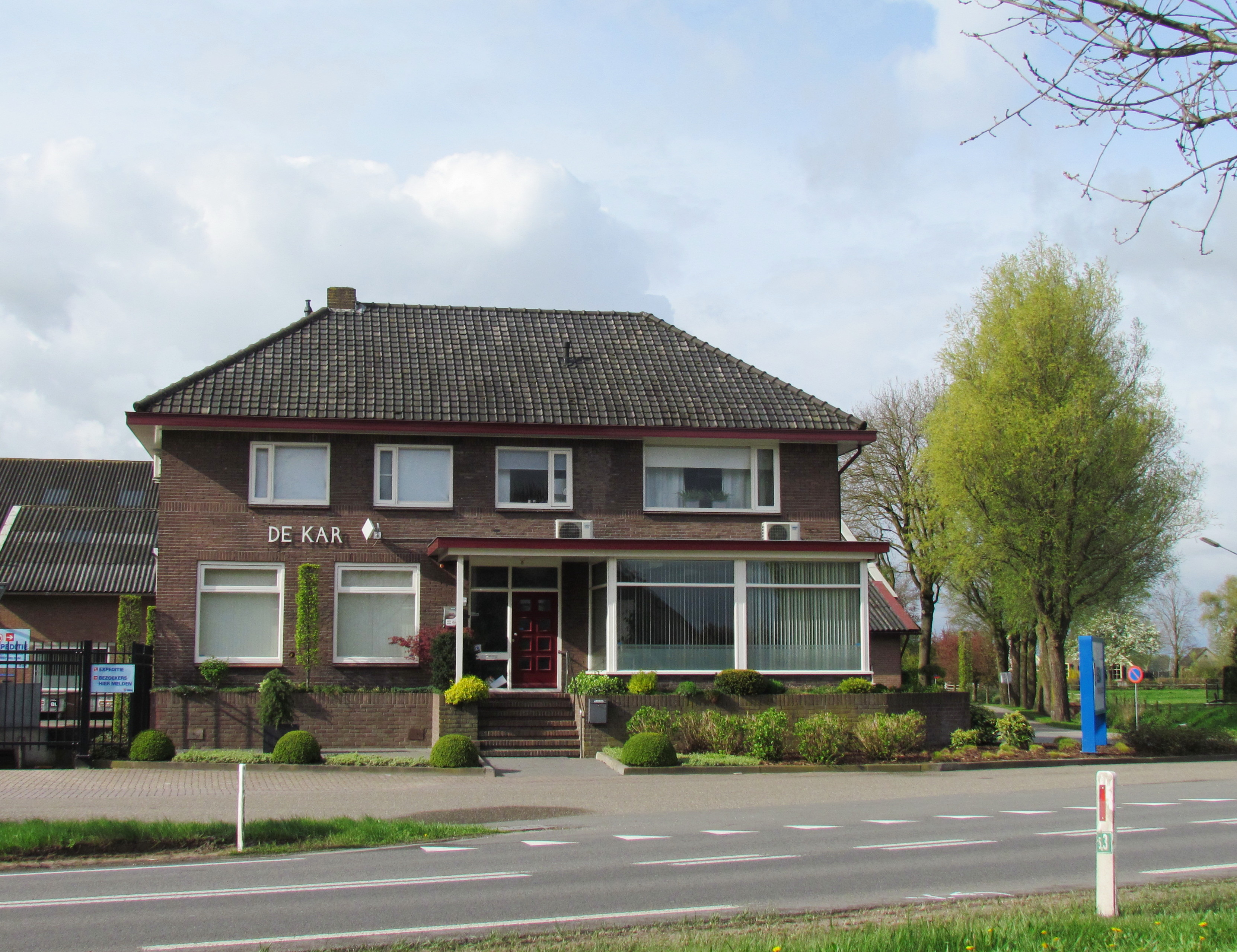 'De Kar', voormalige herberg aan de Zutphenseweg 242 in het Apeldoornse deel van de gelijknamige buurtschap, die er zijn naam aan heeft ontleend